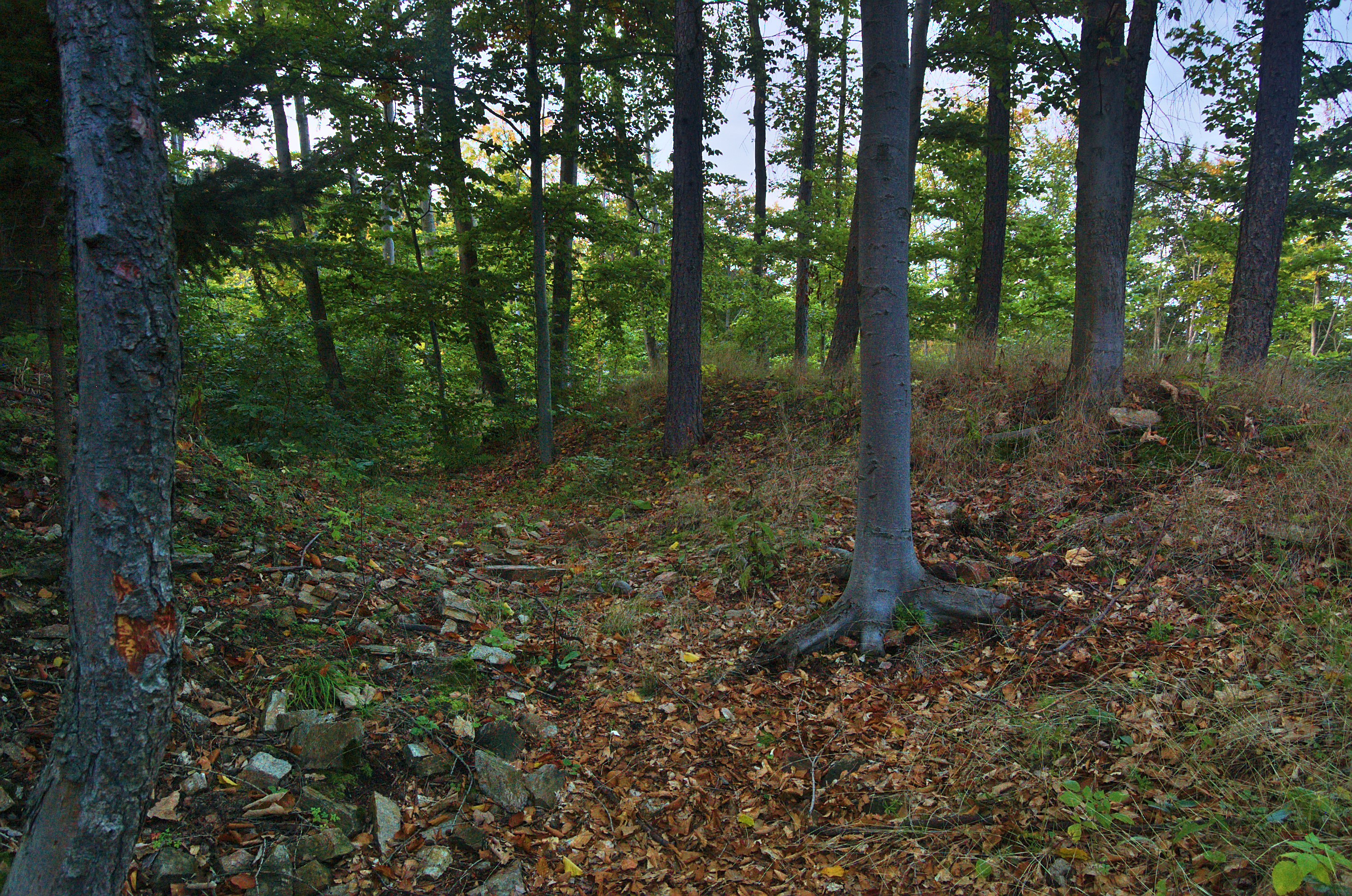 Pozůstatky valu zříceniny hradu Plankenberk, Zálesí, Biskupice, okres Svitavy